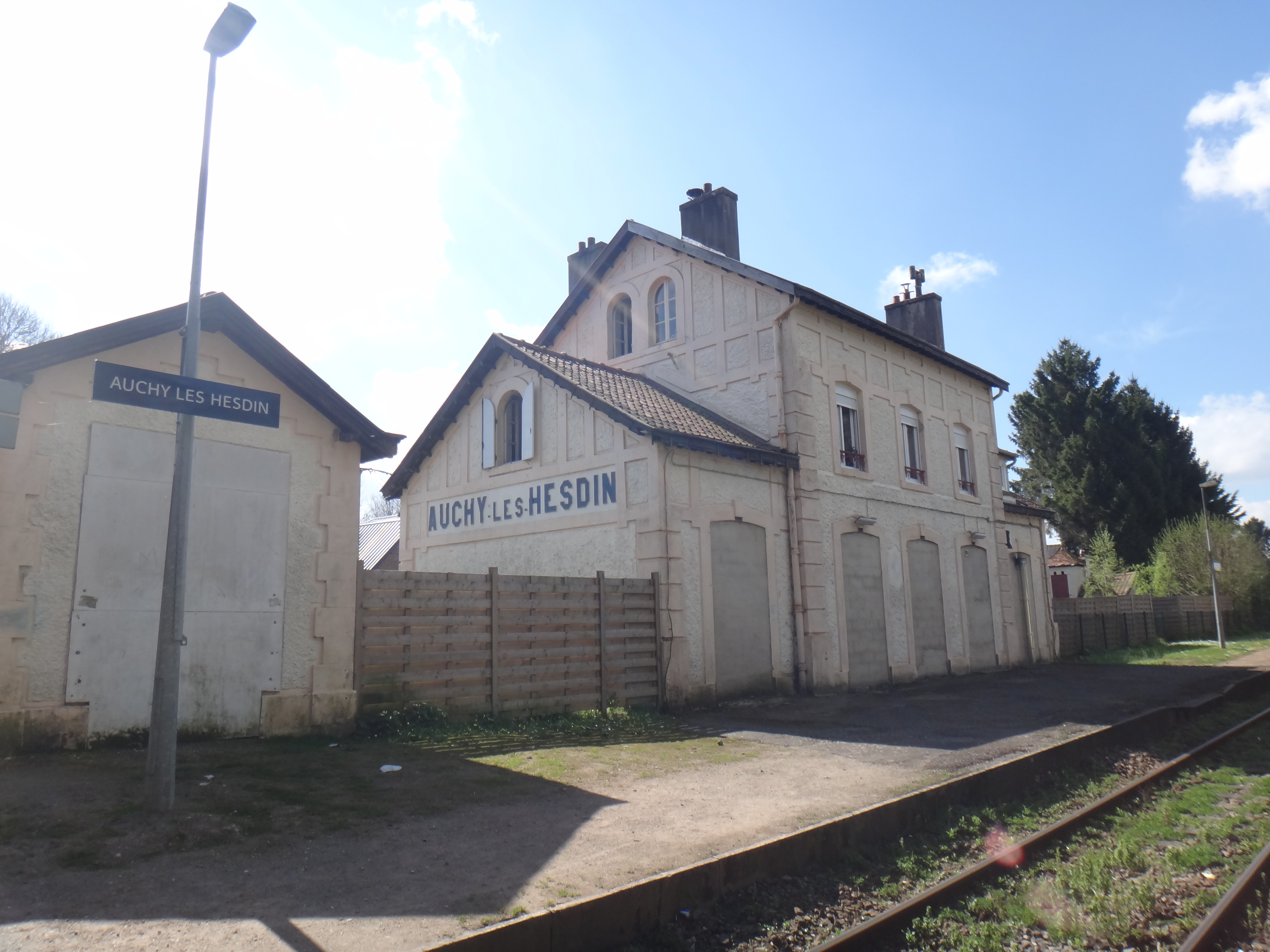 Gare d'Auchy-lès-Hesdin, Pas-de-Calais, France, en 2014